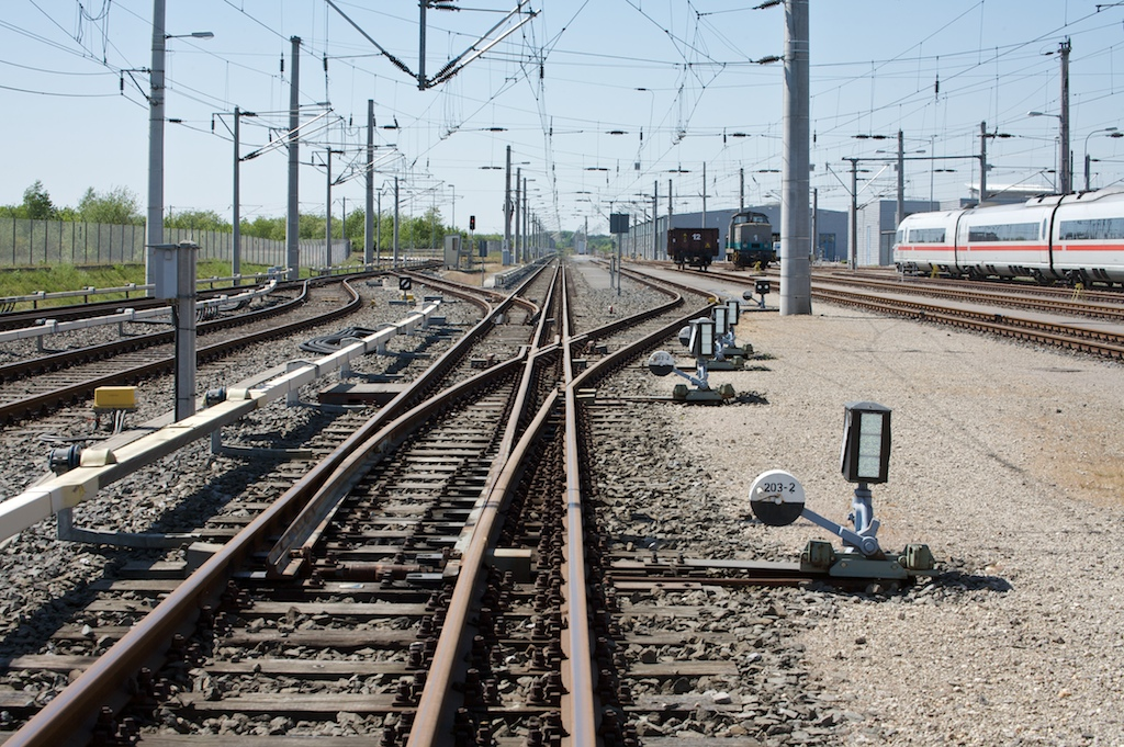 Innenansicht des Prüfcenters Wegberg-Wildenrath